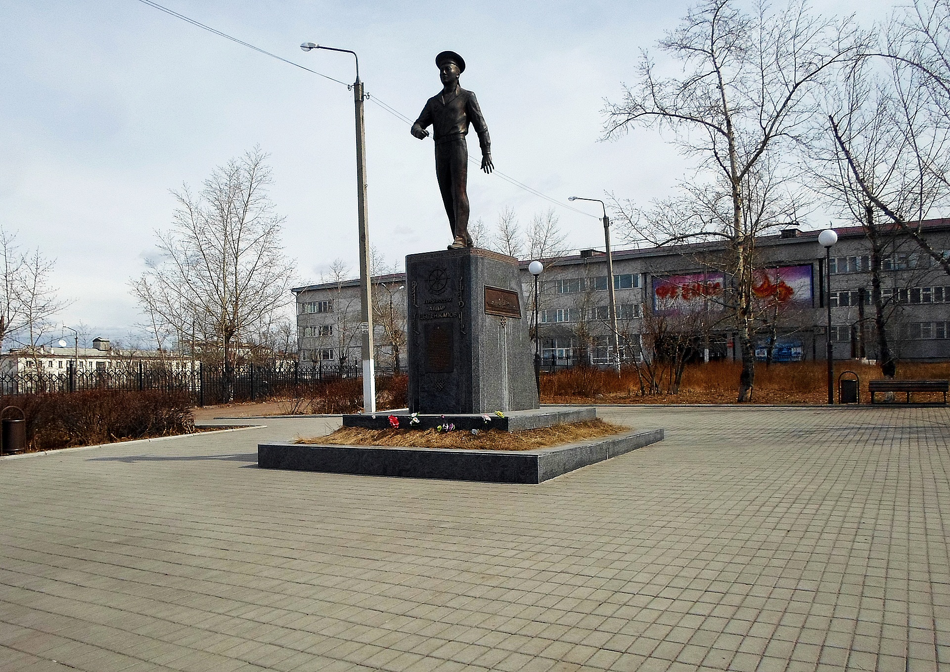 Улан-Удэ. Памятник Алдару Цыденжапову.